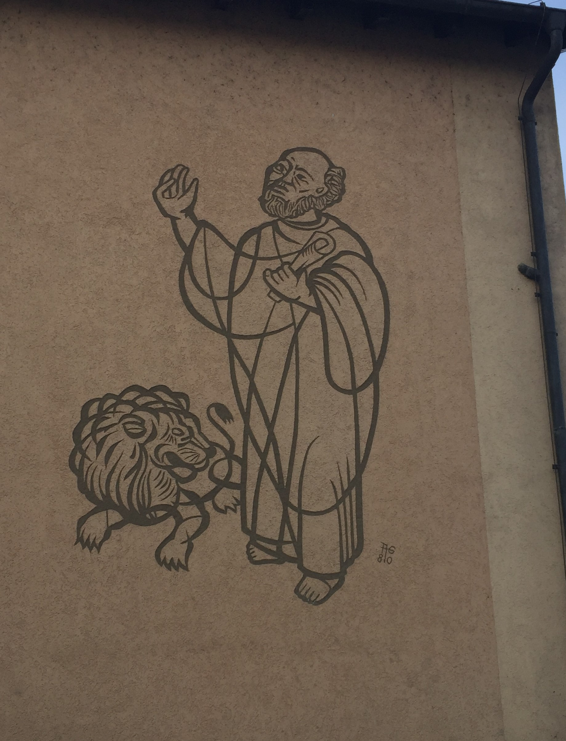 EIn Sgraffiti von Adolf Greis auf der Insel Reichenau. Hier hat er den heiligen Markus mit seiner Symbilfigur, dem Löwen dargestellt.